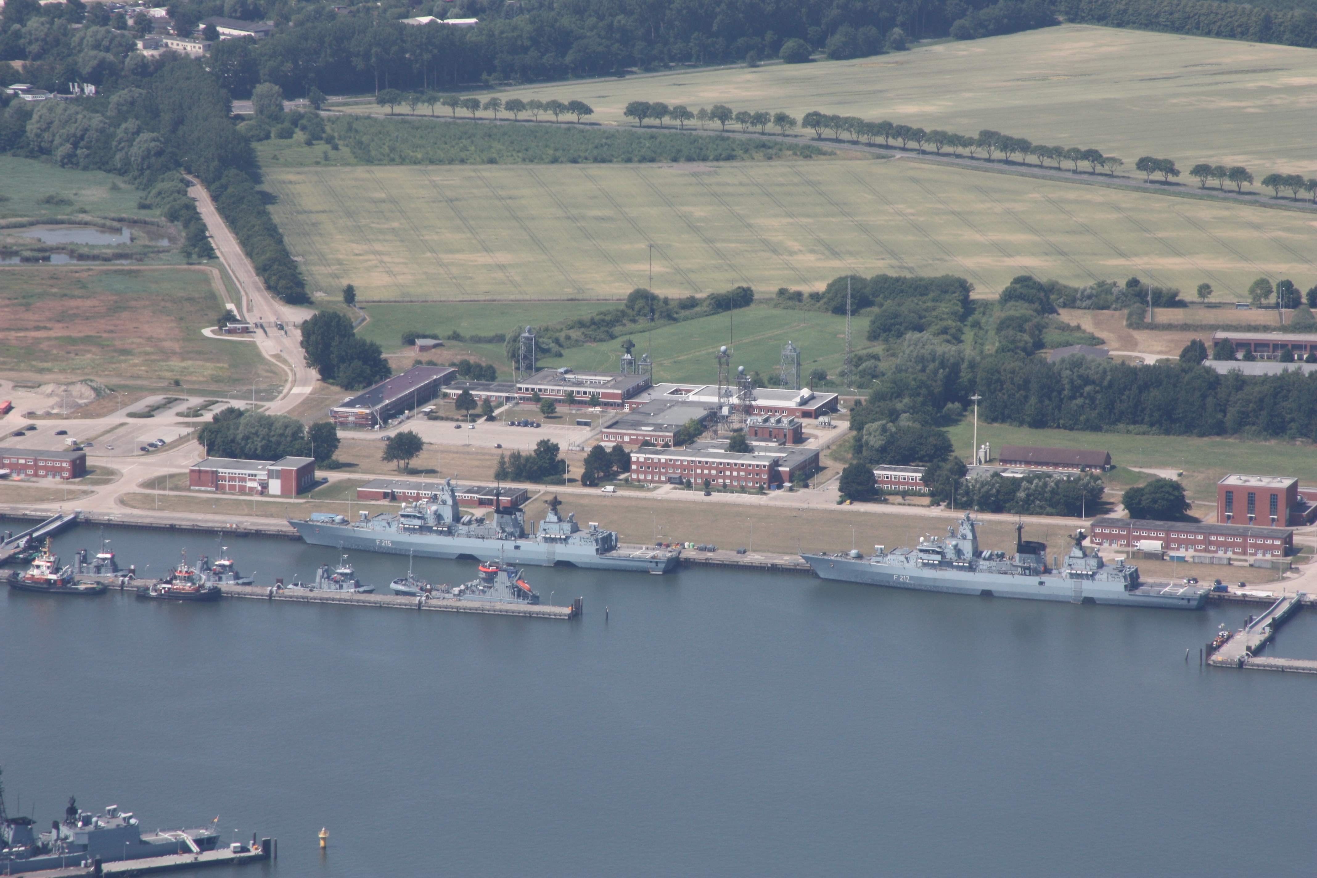 Flug über den Jadebusen und Wilhelmshaven, von Nord nach Süd; weiter nachOldenburg; Flughöhe 500 m = 1500 ft; Juli 2010